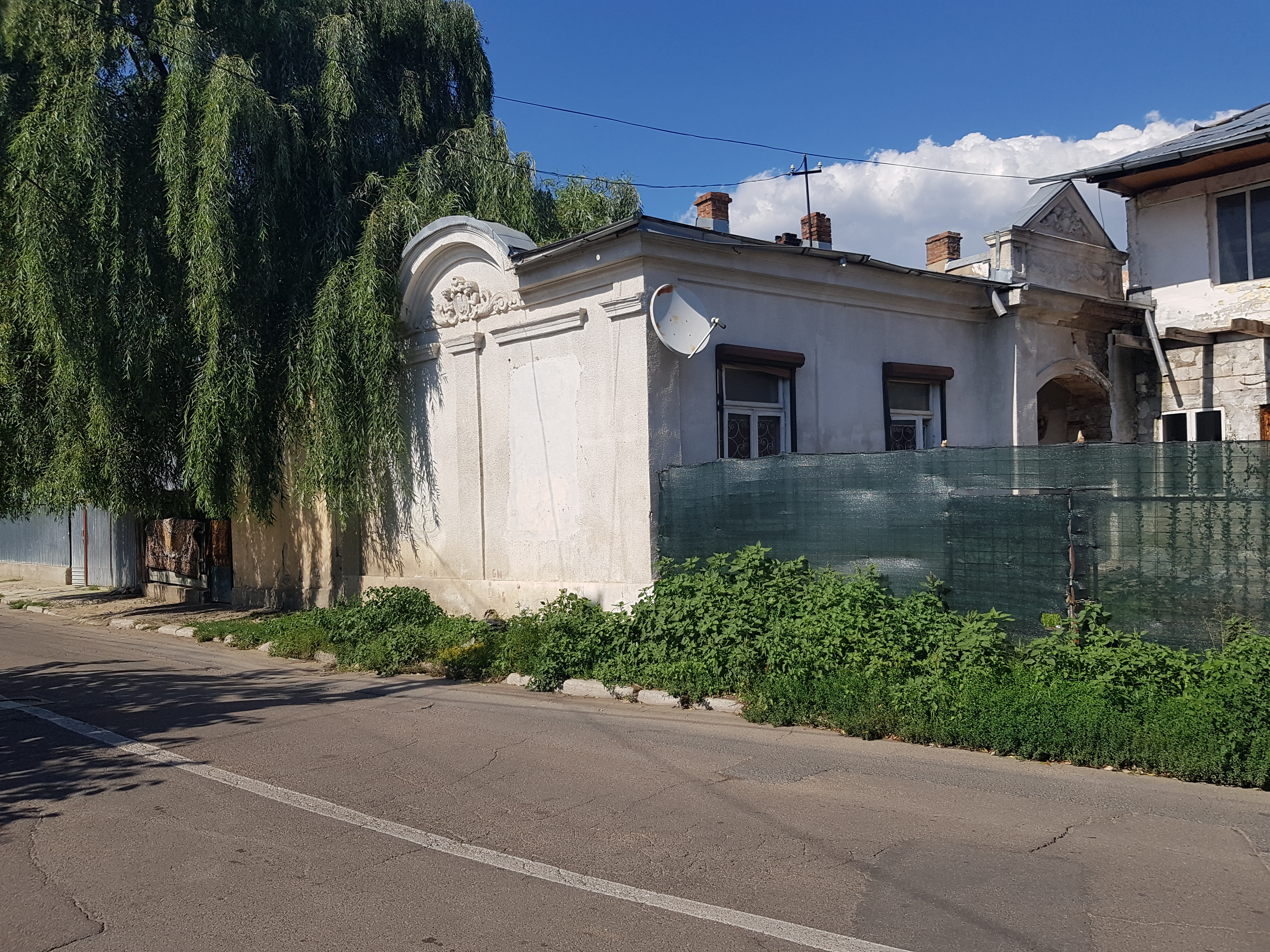 Casa colonel Albu